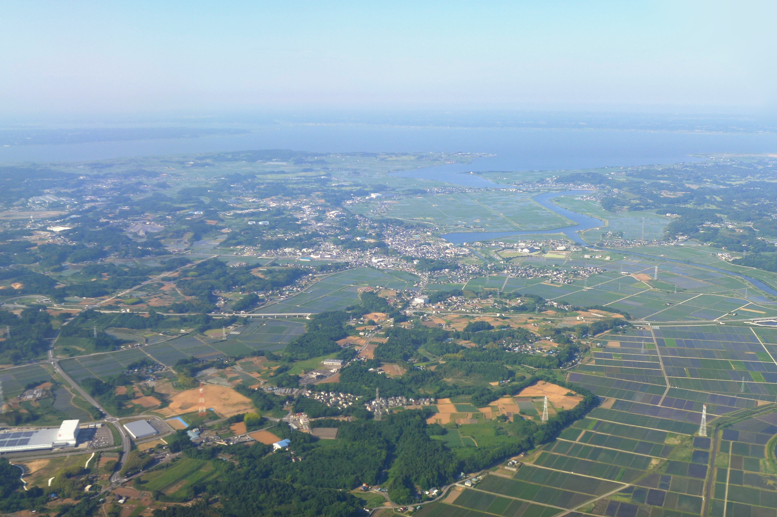 Inashiki 稲敷市